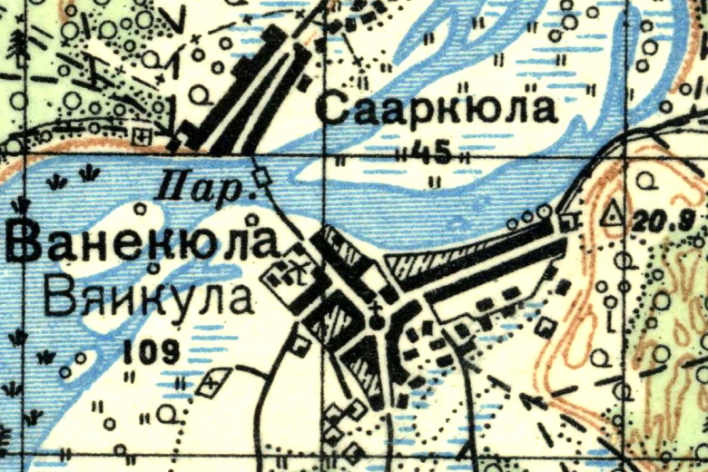 Топографическая карта Ленинградской области, квадрат О-35-21-В (Нарва), деревни Венекюля и Саркюля